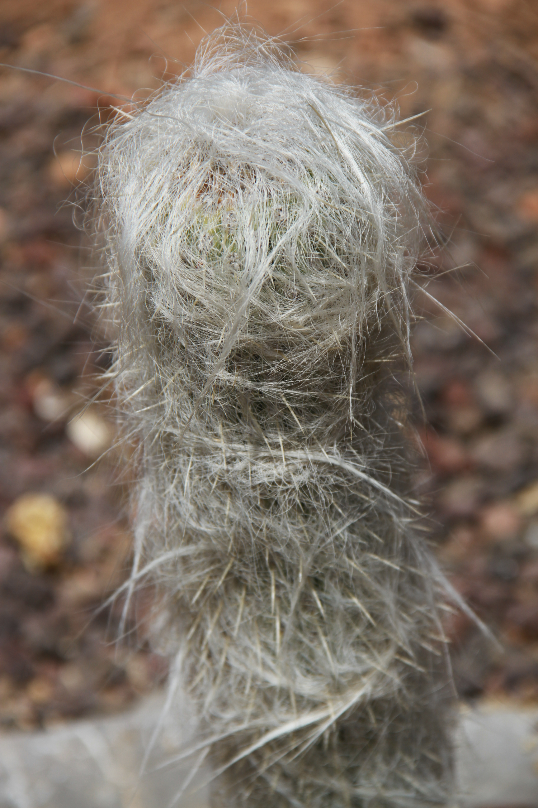 Сольєрський ботанічний сад